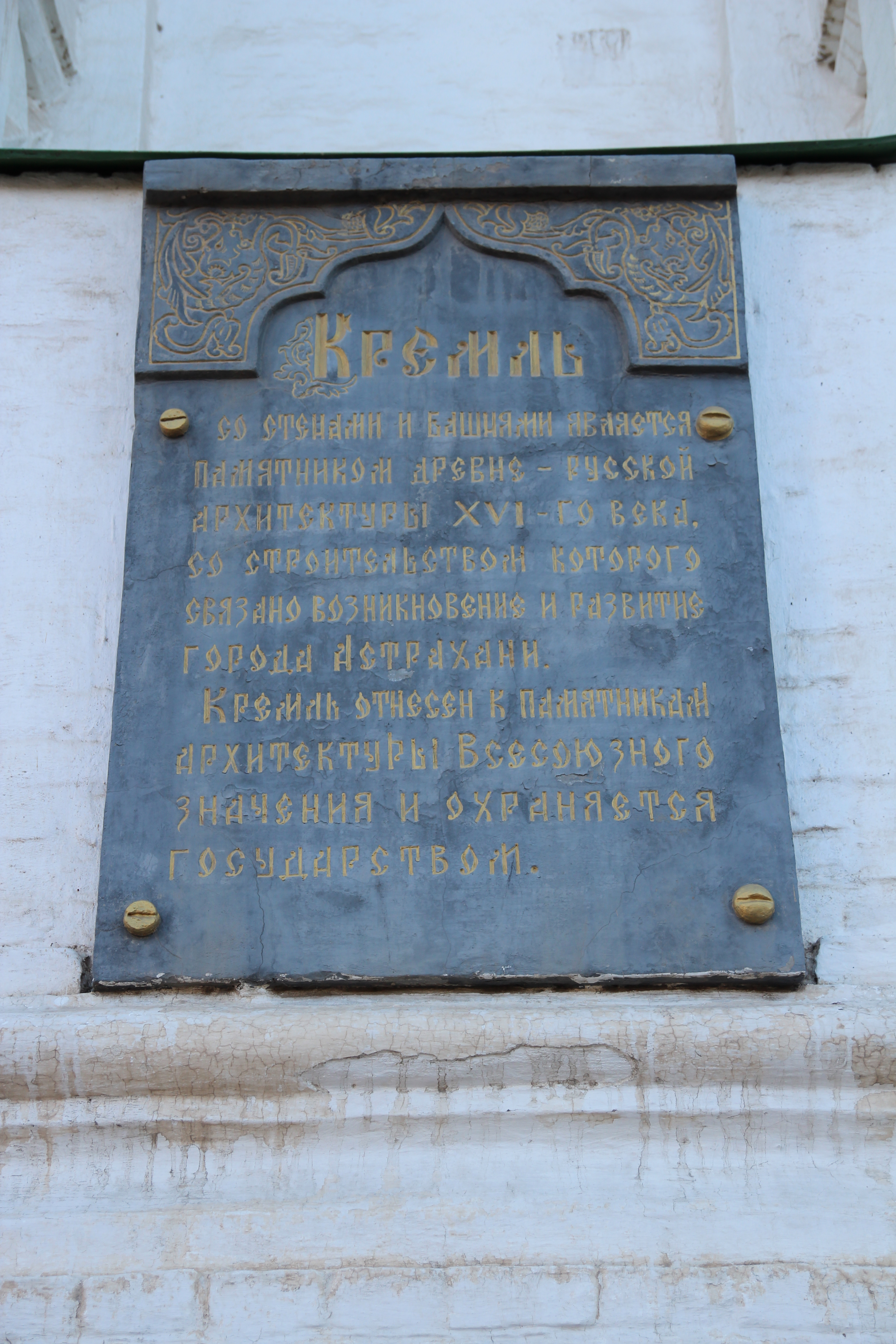 Табличка на Астраханском кремле